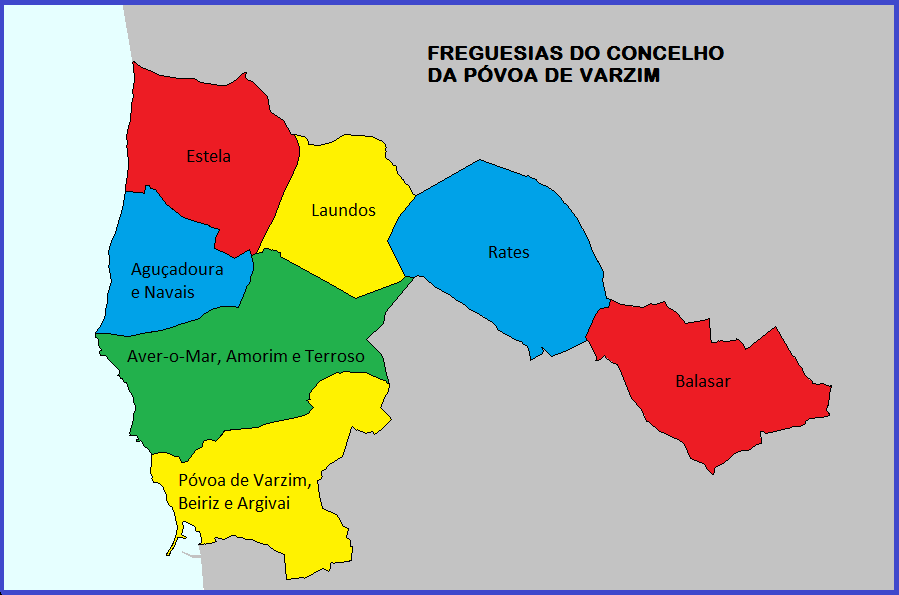 Freguesias do concelho da Póvoa de Varzim